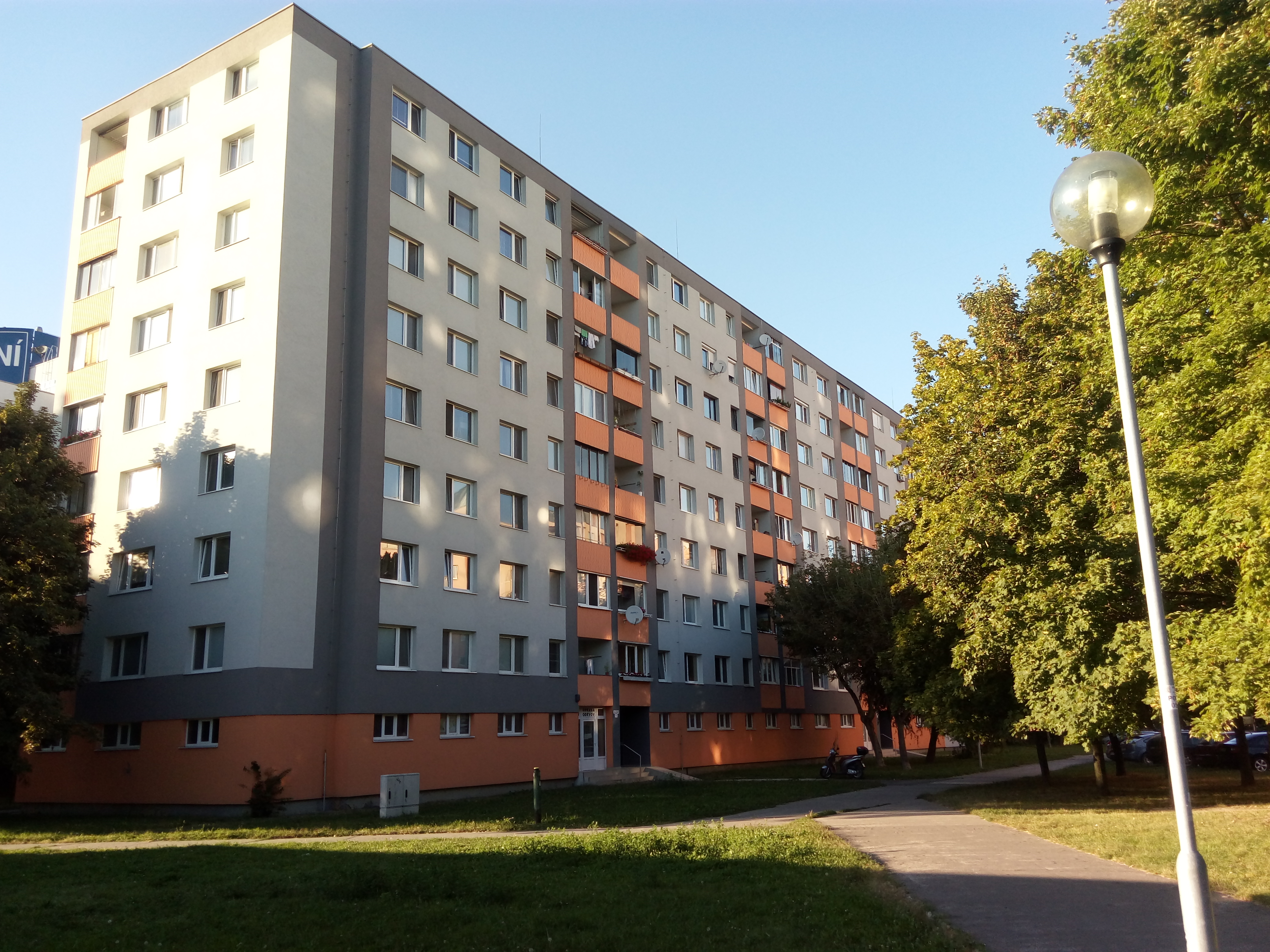 Belinského 24, Petržalka, Bratislava